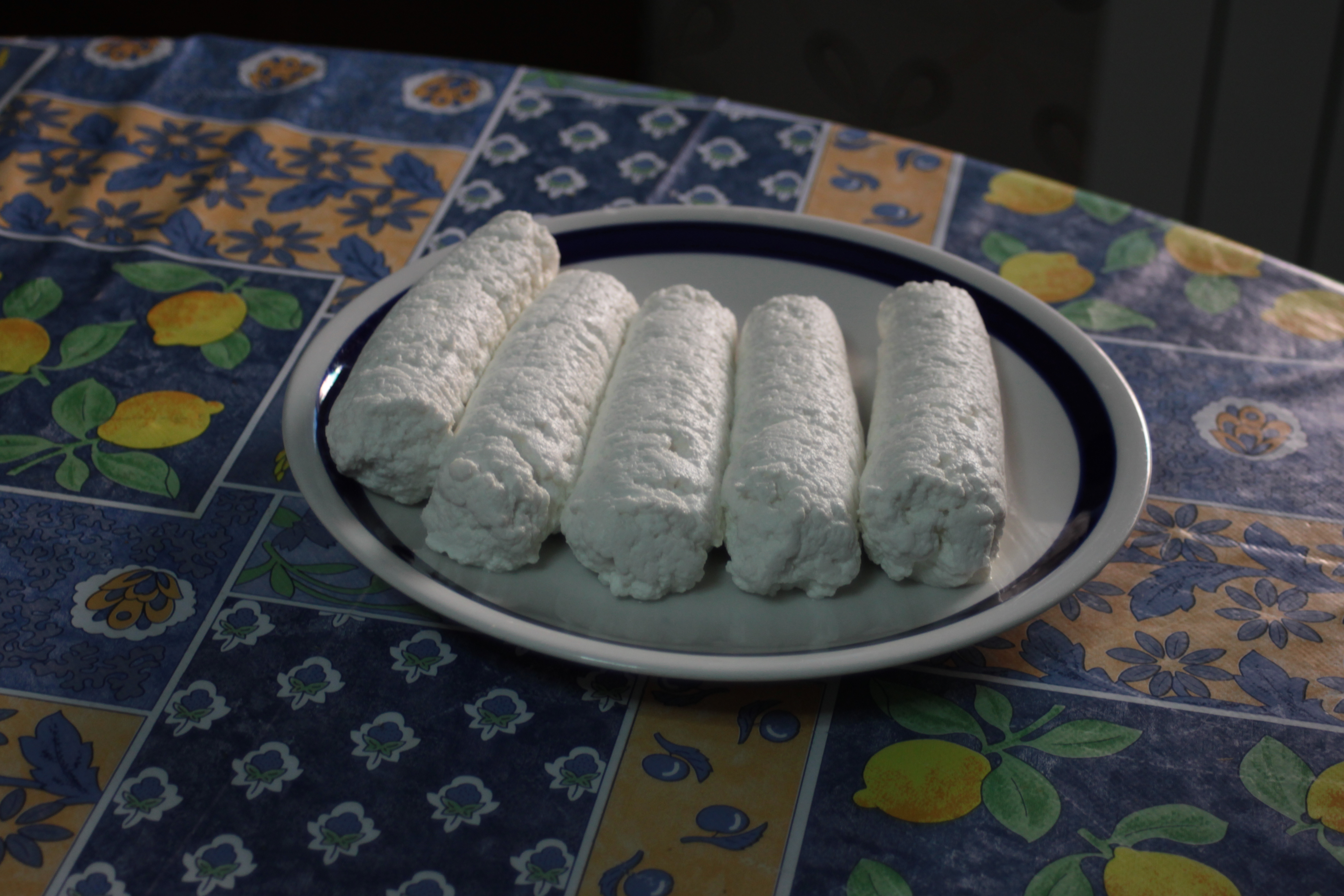 Ricotta di Capra della Vallata dello Stilaro